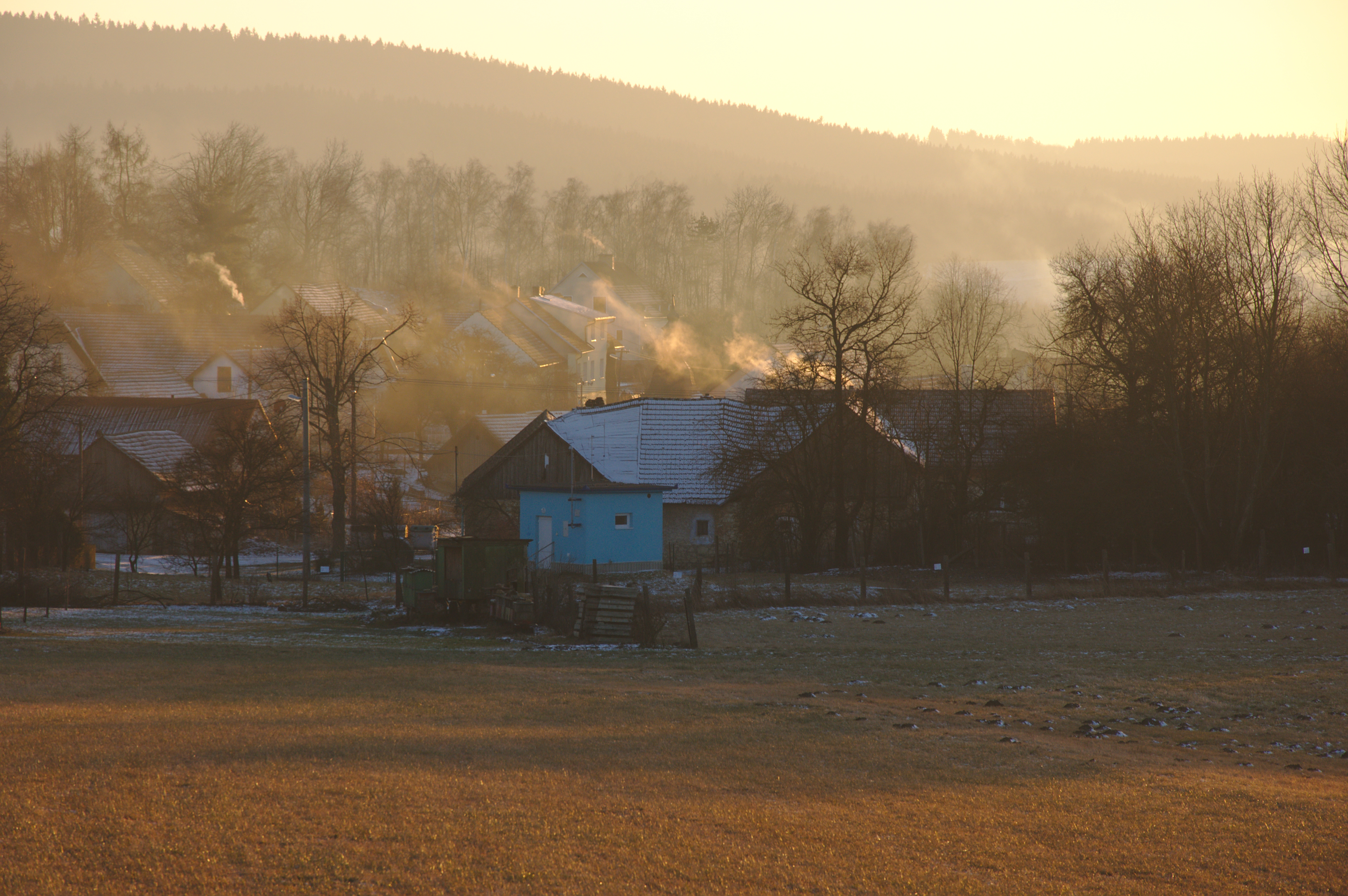 Pohled na obec od severu, Rozsíčka, okres Blansko